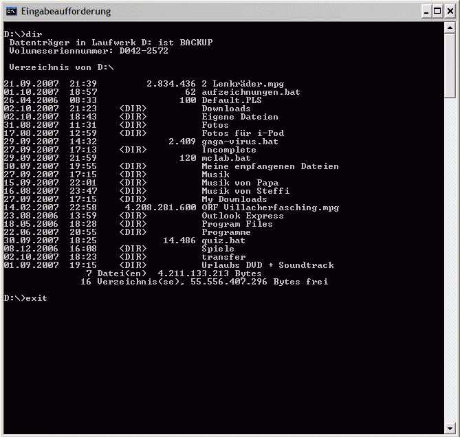 eine einfache (in der Vorgabe, ohne den Schalter /O, ungeordnete oder auch unsortierte) Ausgabe des dir-Befehls an der auch Cmd genannten Eingabeaufforderung, hier auf einem Windows XP; … nach der genannten und (im Bild) angezeigten Ausgabe folgt (unten, in der letzten Zeile) der exit-Befehl, welcher (nach Betätigung der Eingabetaste) das betreffende (Befehls-)Fenster schließen würde